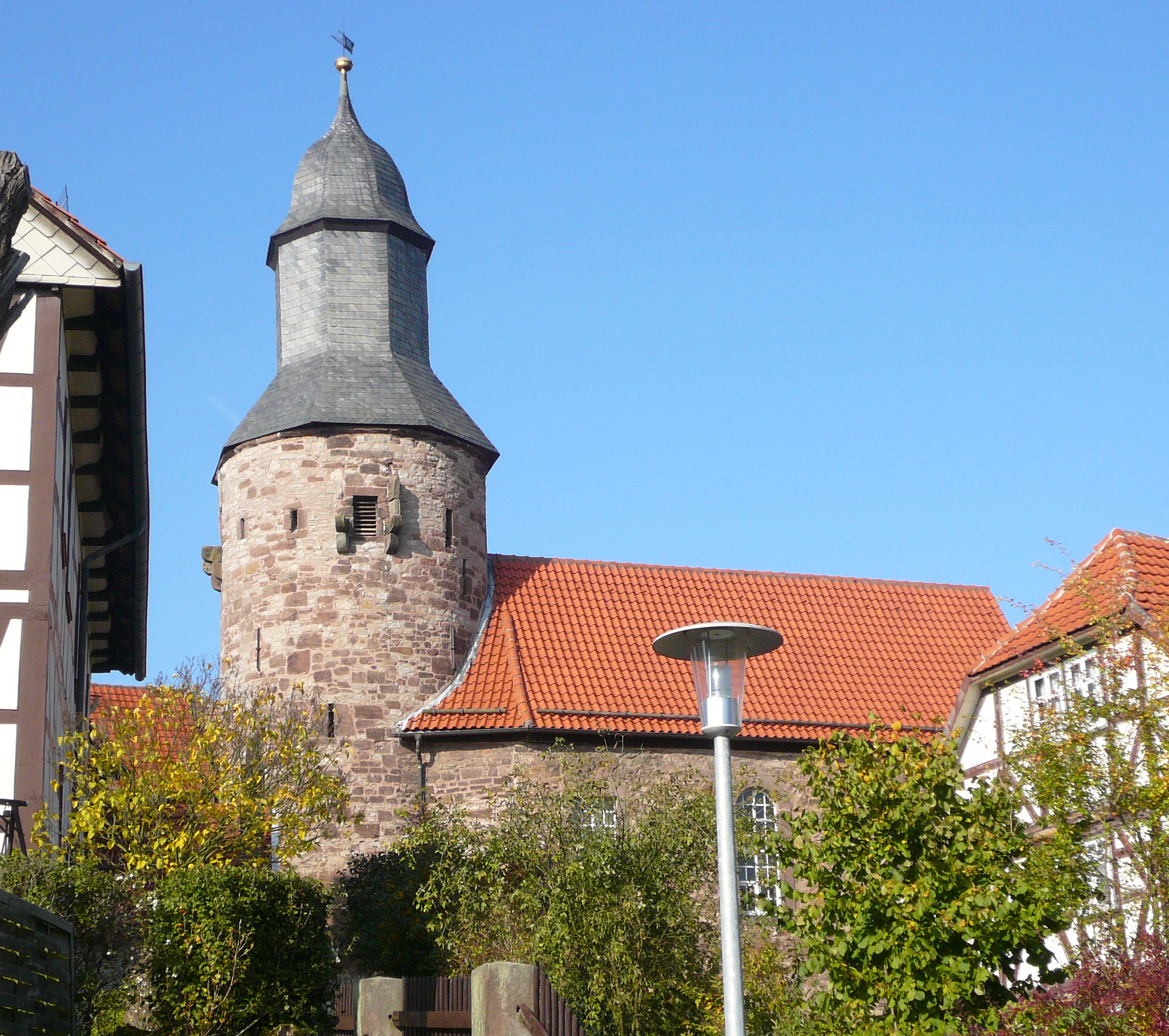 Dorfkirche in Reckershausen, Gemeinde Friedland, Landkreis Göttingen, Niedersachsen. Mittelalterlicher Wehrturm, Kirchenschiff im 18. Jh. angebaut, Umbauten 1821.